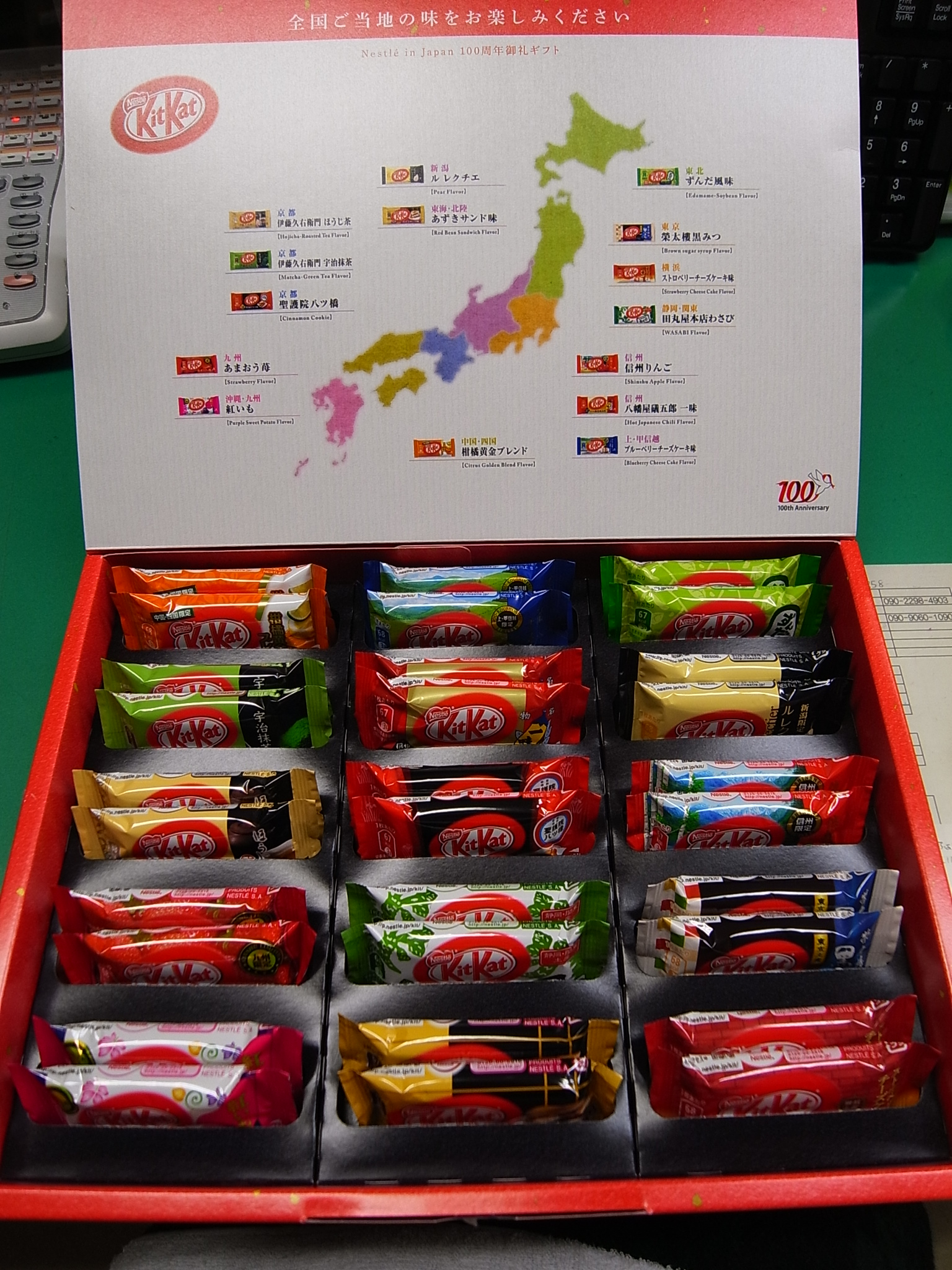 ご当地キットカット